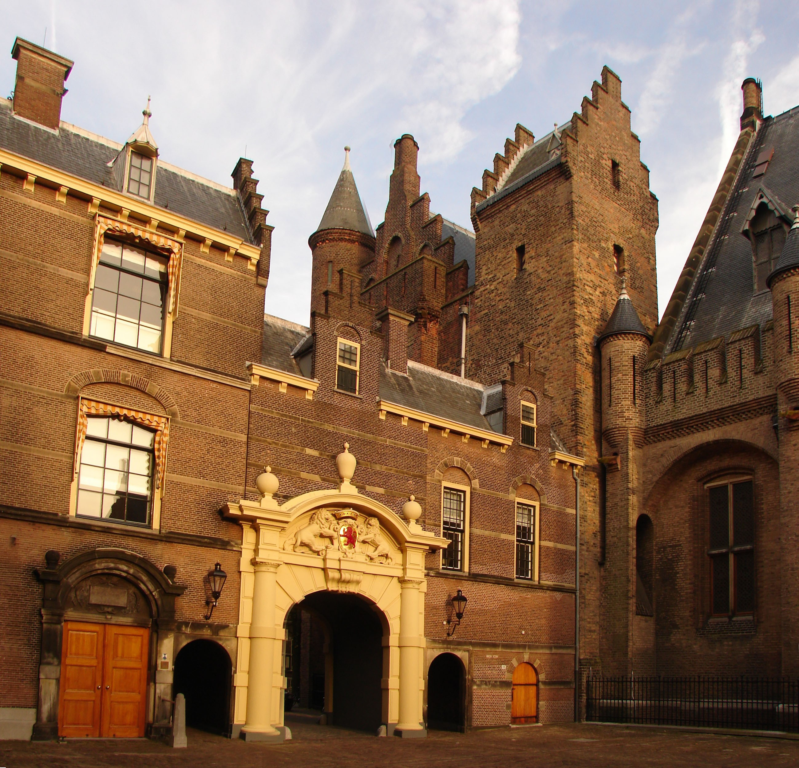 De Binnenpoort in het Binnenhof te 's Gravenhage